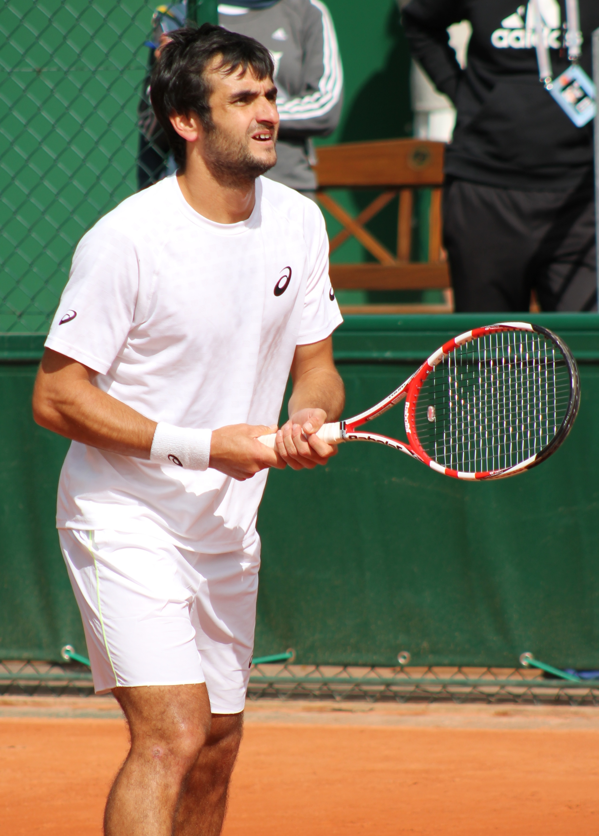 Serra RG13